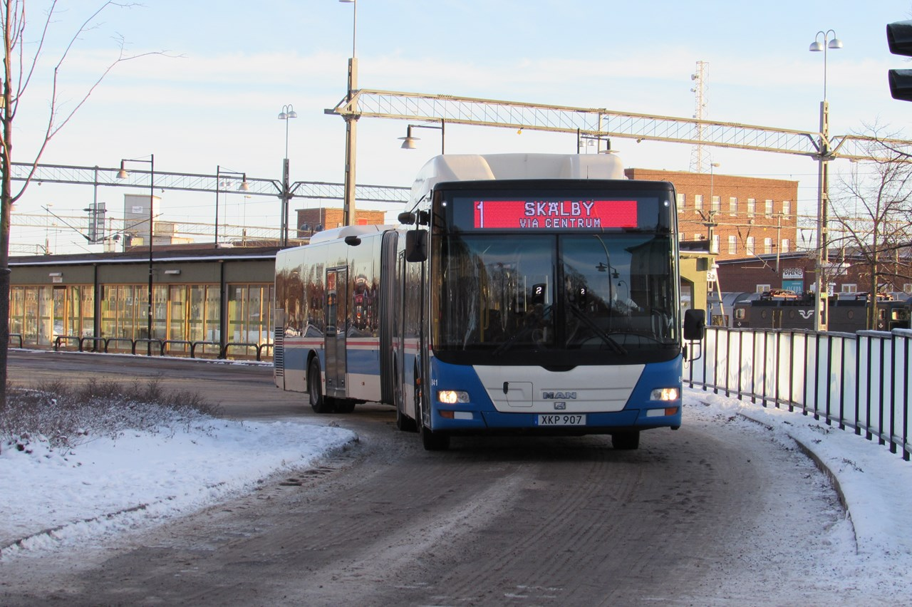 En av VLs MAN bussar avgår från centralen i Västerås mot Skälby som linje ett.